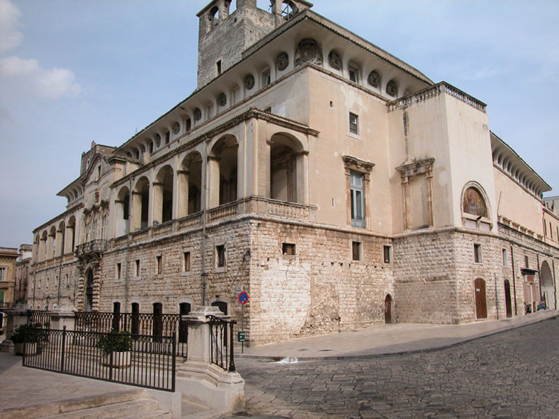 Castello de' Mari presso Acquaviva delle Fonti